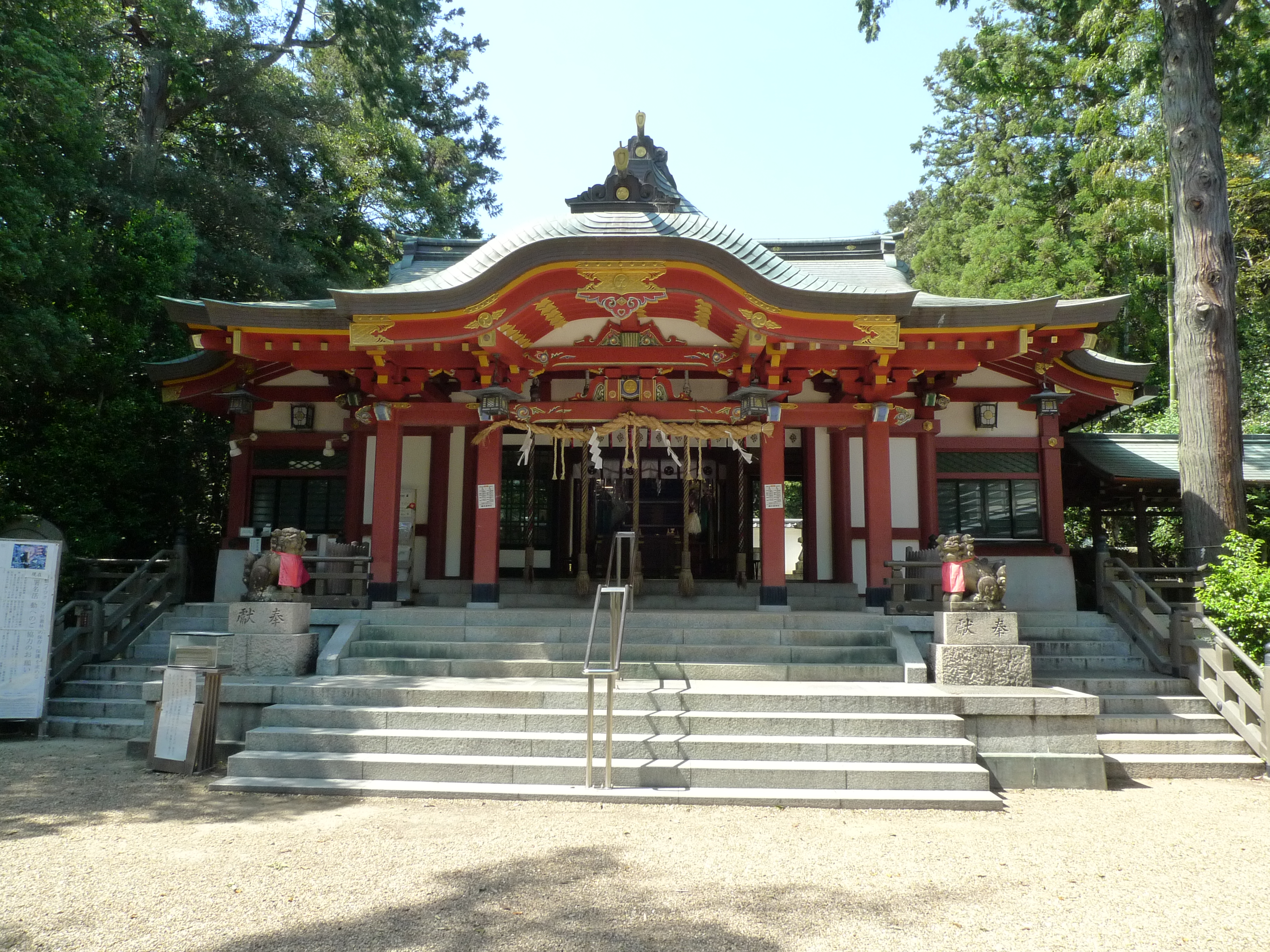 越木岩神社 拝殿